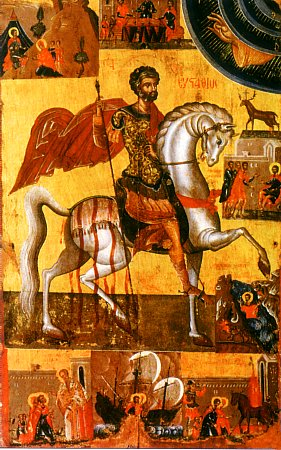 Saint Eustace